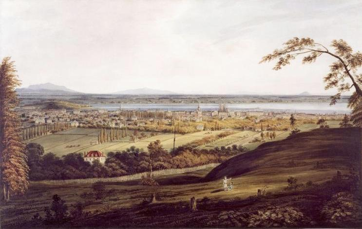 Montreal in 1832.label QS:Len,"Montreal in 1832."label QS:Lfr,"Montréal en 1832"